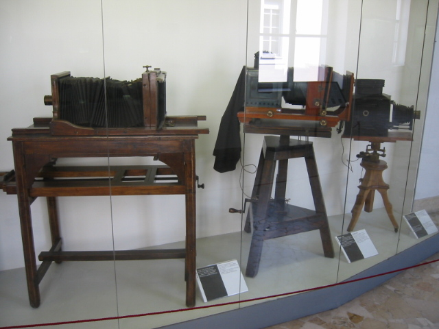 Oeuvre du Musée des sciences & technologies Léonard de Vinci de Milan - Italie